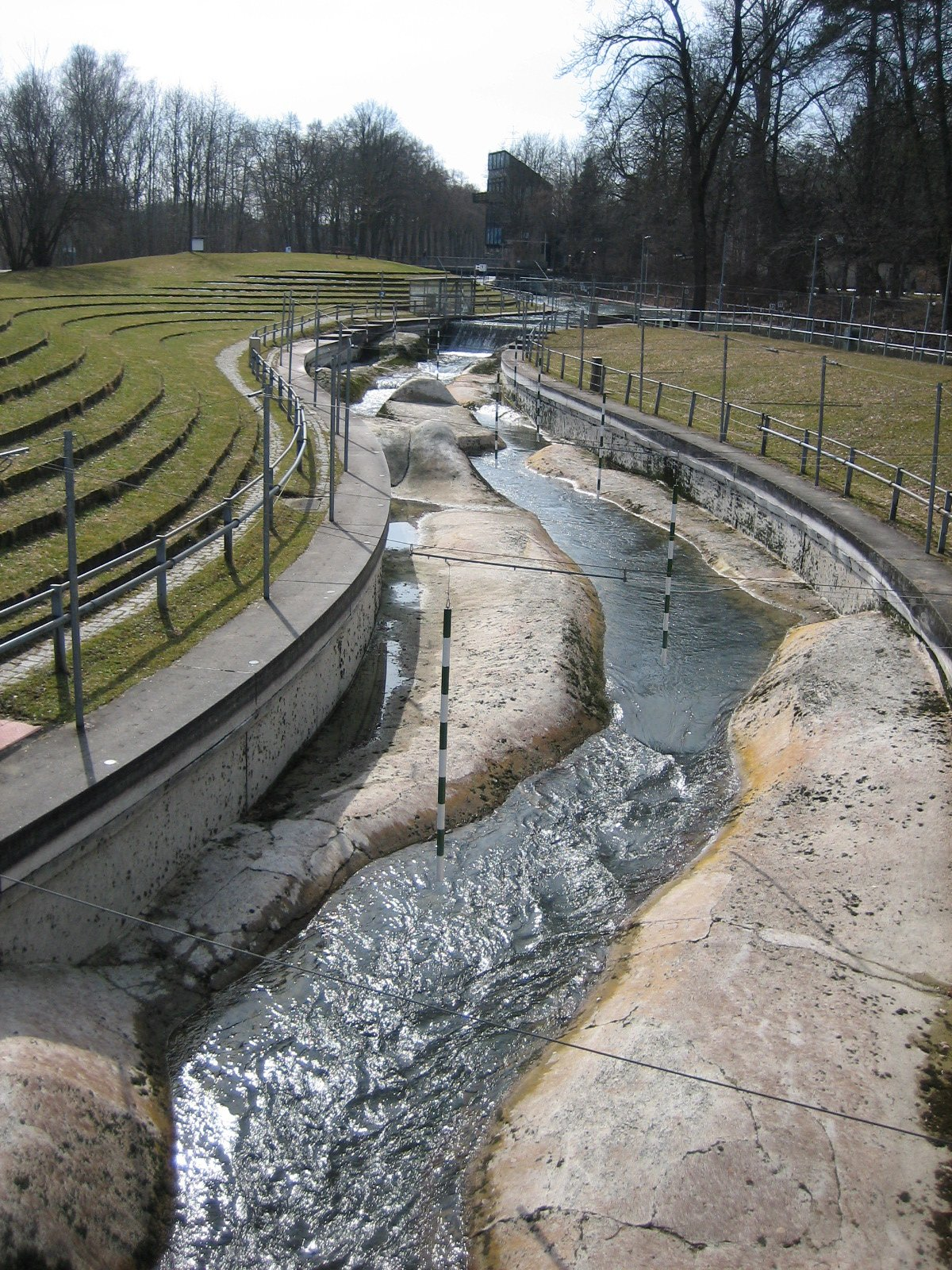 Eingebaute Hindernisse im Eiskanal